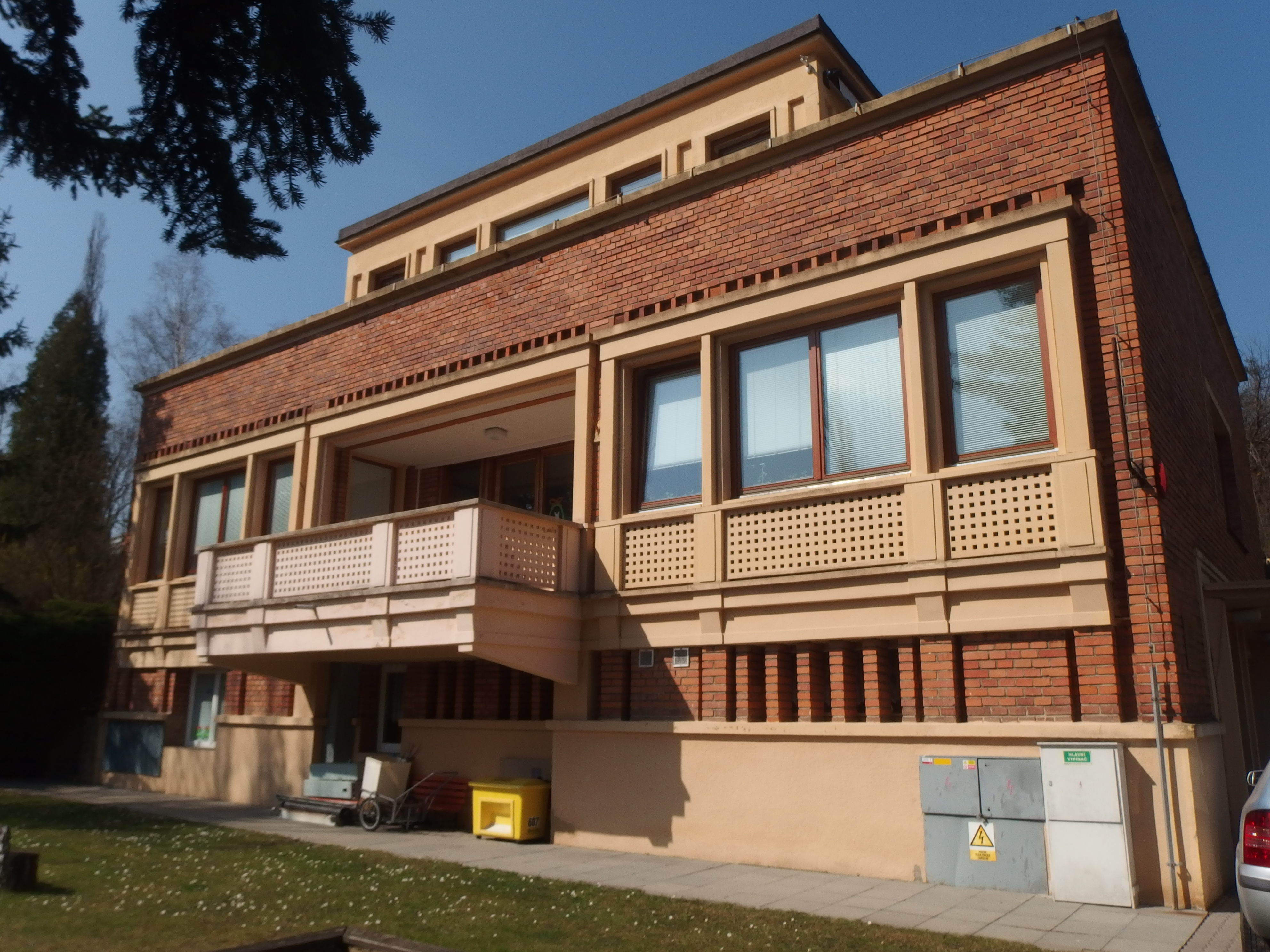 Zlín-Nivy, Žlebová 2894, bývalá vila Jiřího Hanzelky. Architekt Zdeněk Plesník, 1955. Cestovatel věnoval vilu v roce 1958 městu, dnes rehabilitační stacionář.